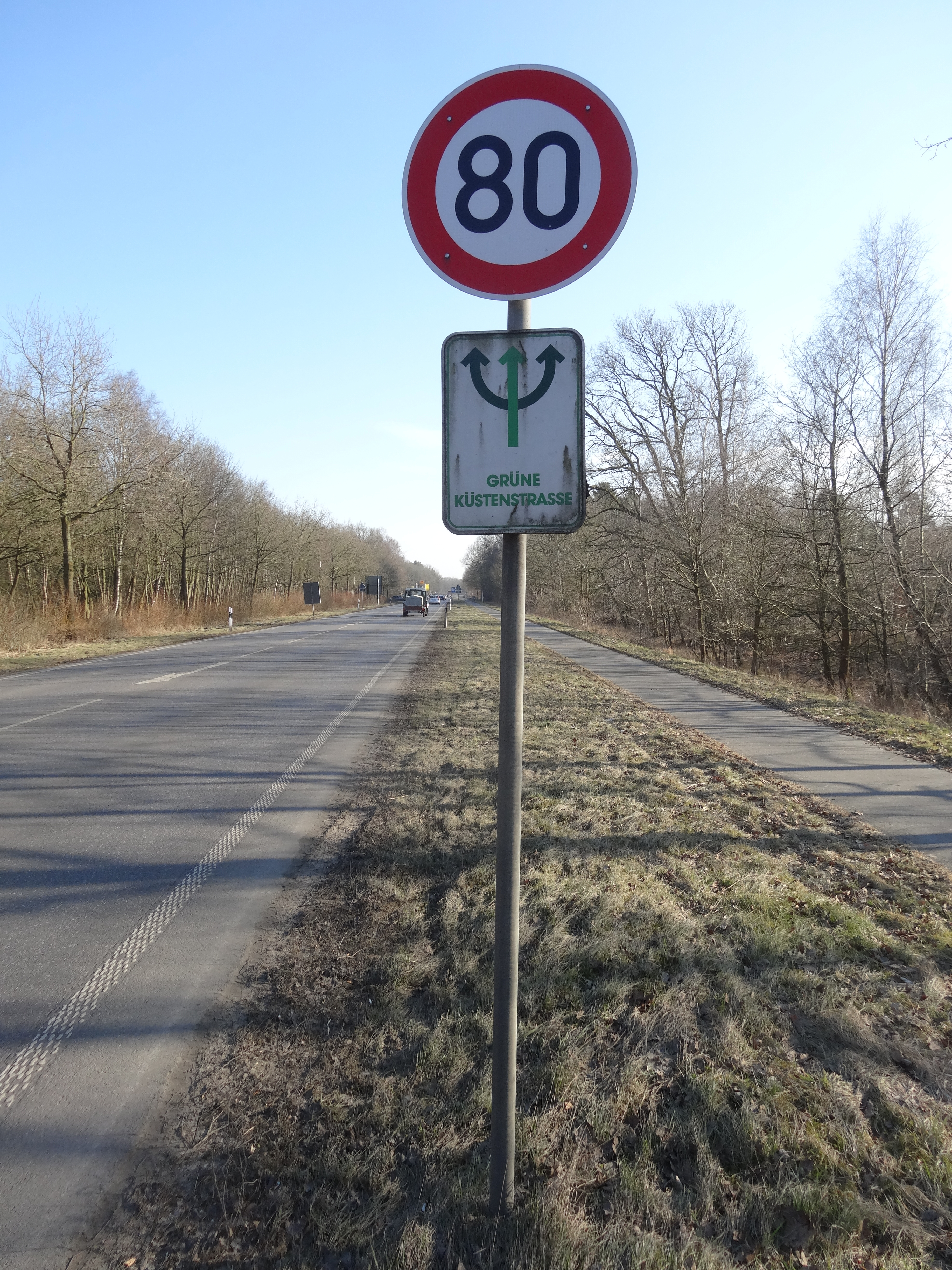 Vergessenes Schild an der L119 in Dägeling